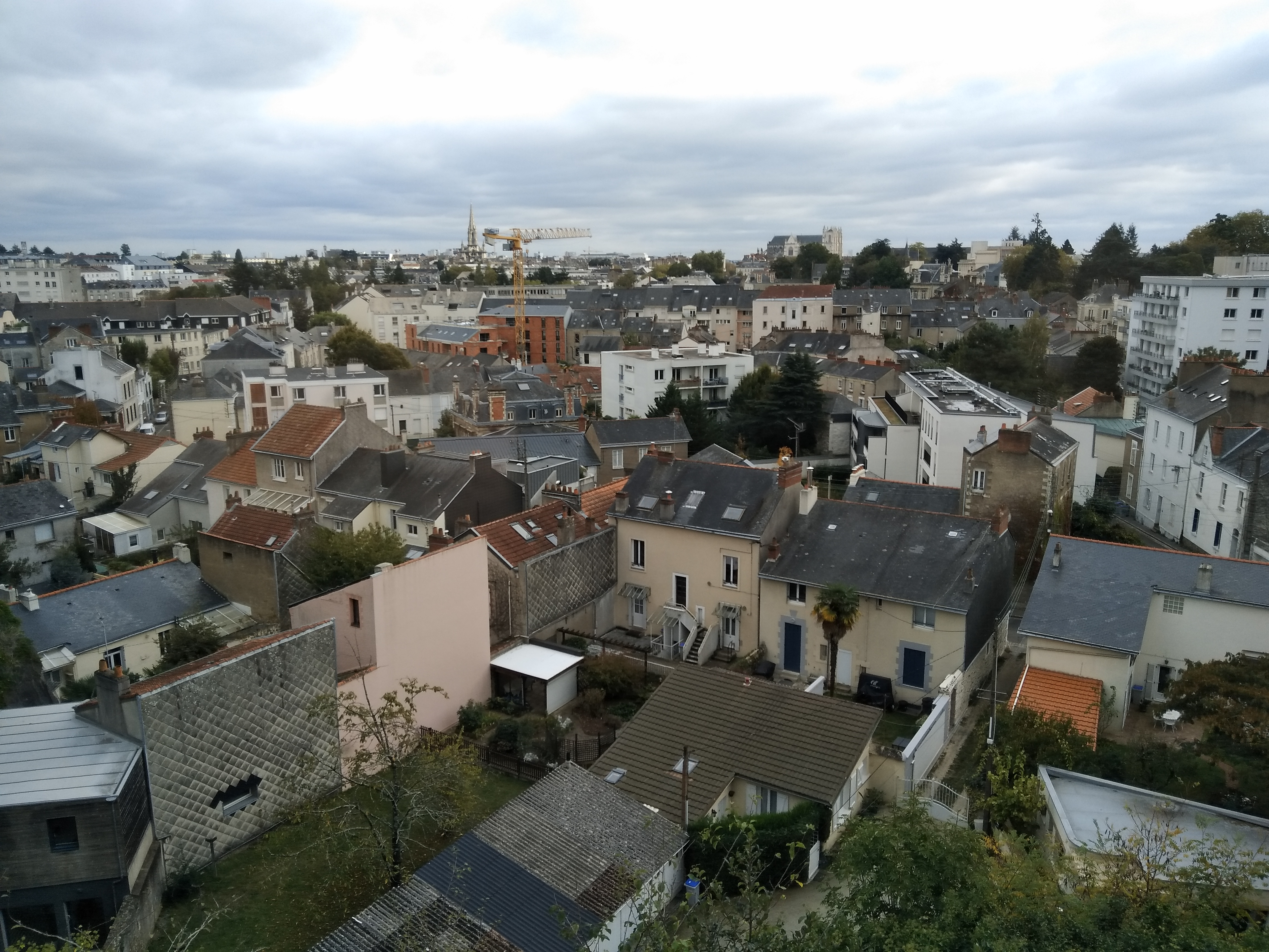 Quartier Saint Félix vu depuis la rue Leglas Maurice (Nantes, France)